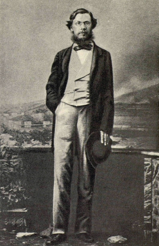 Добролюбов, Николай Александрович. Неаполь. Май 1861 года.